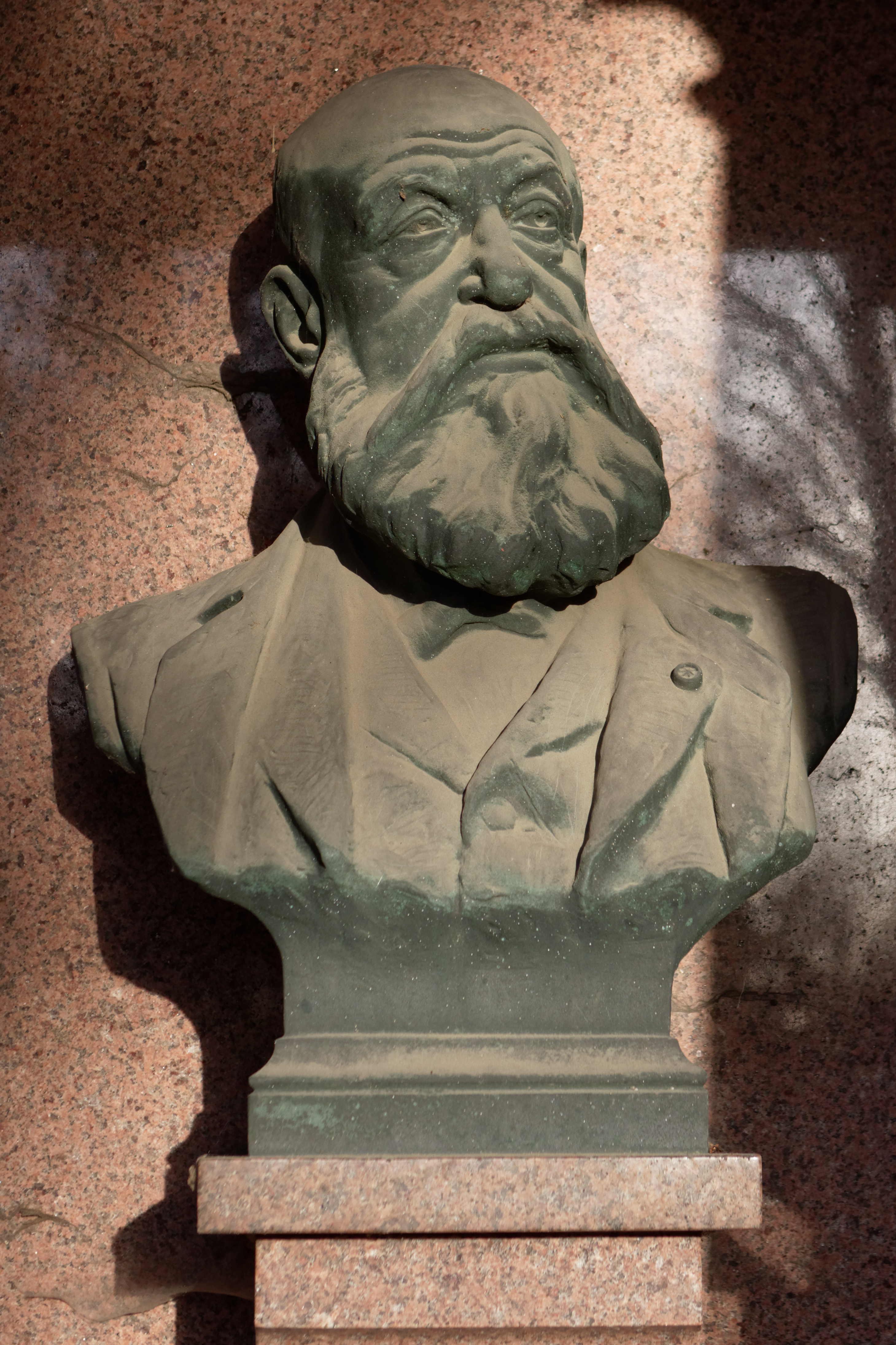 Fabio Stecchi (1855-1928), Auguste Tranquille Loutreuil, buste en bronze.